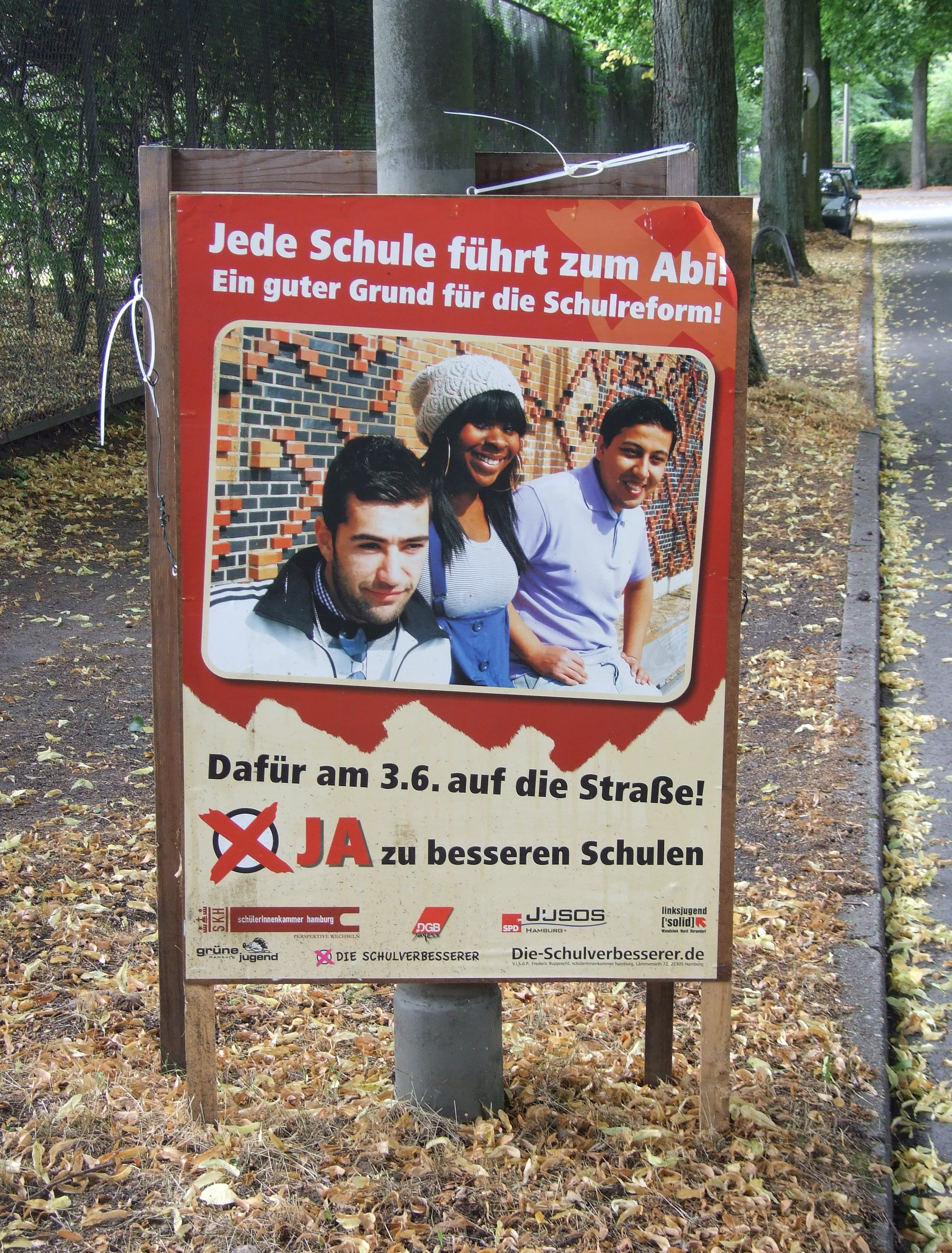 Schulreform in Hamburg; "vergessenes" Plakat zum Volksentscheid drei Monate zuvor